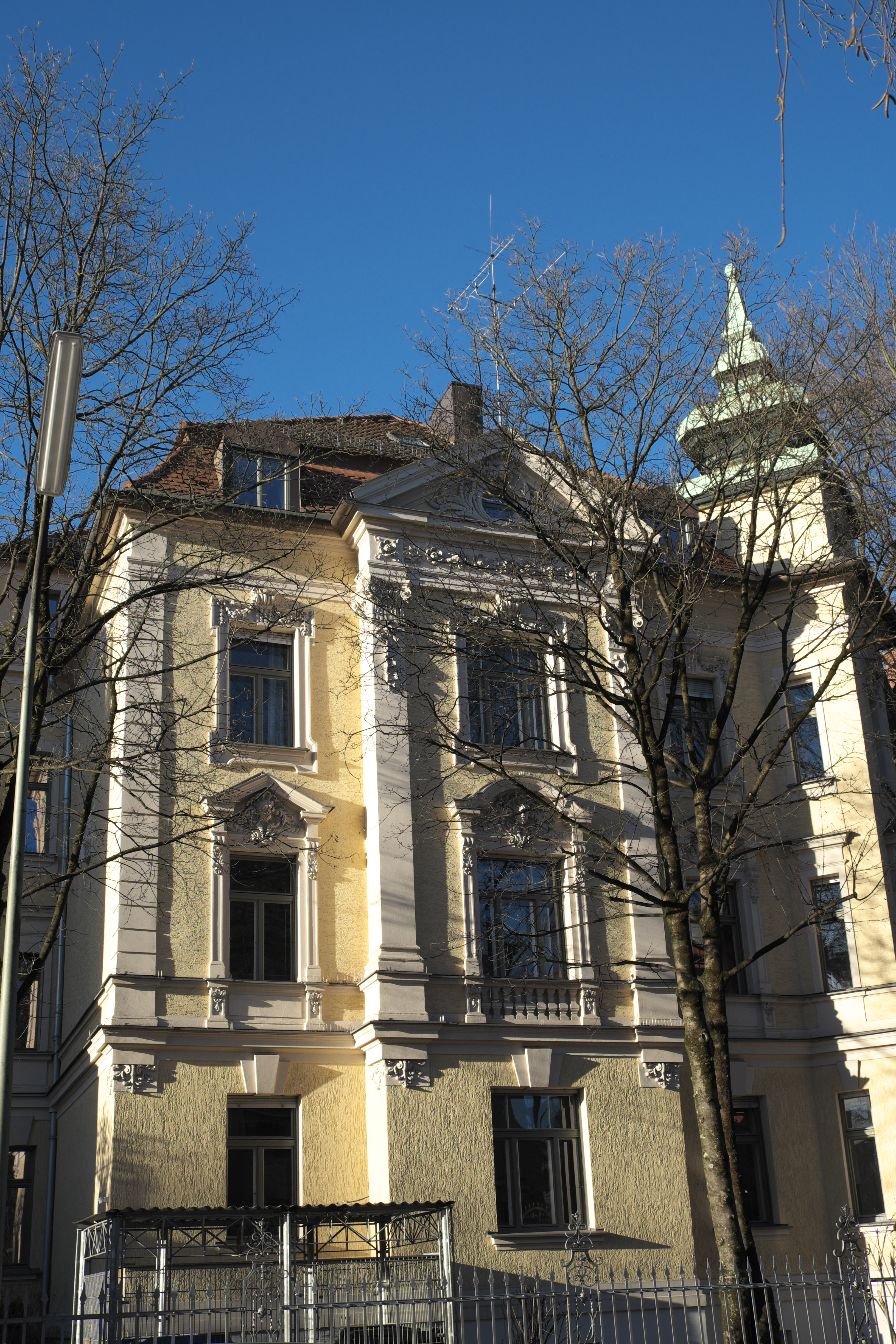 Mietshaus in der Schubertstraße 10 in der Ludwigsvorstadt im Stadtbezirk Ludwigsvorstadt-Isarvorstadt in München (Bayern/Deutschland), 1895 von Albert Theodor Lenz erbaut